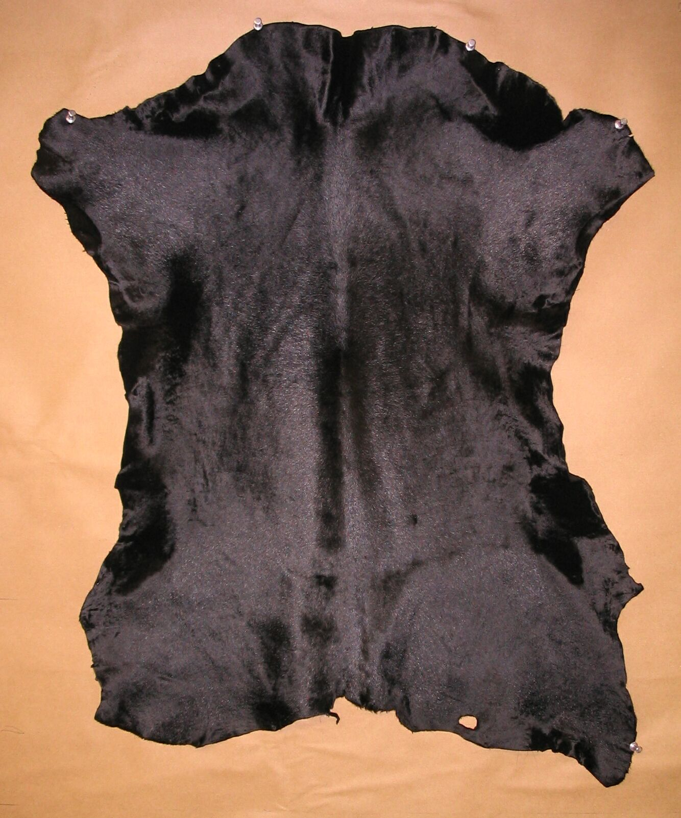 Calf skin black dyed, from Argentina - Schwarzgefärbtes argentinisches Kalbfell